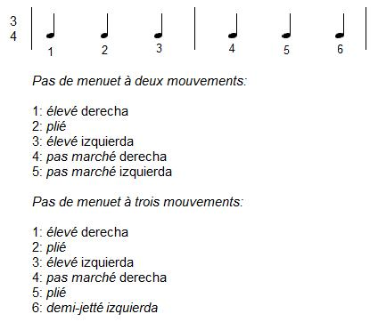 Descripción de los pasos de danza del minueto.